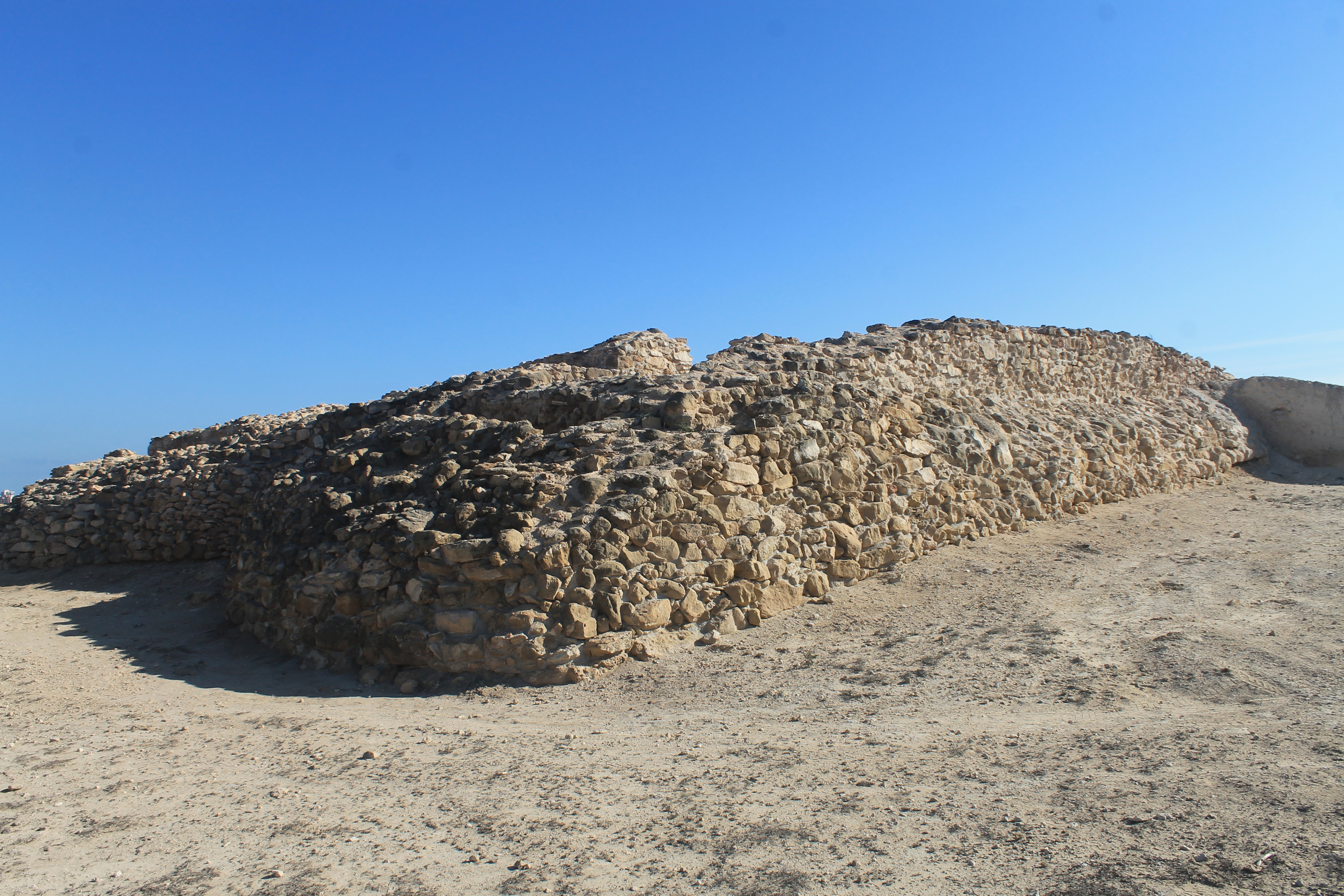 Restos del lienzo sur de la fortaleza fenicia de Cabezo pequeño del estaño.